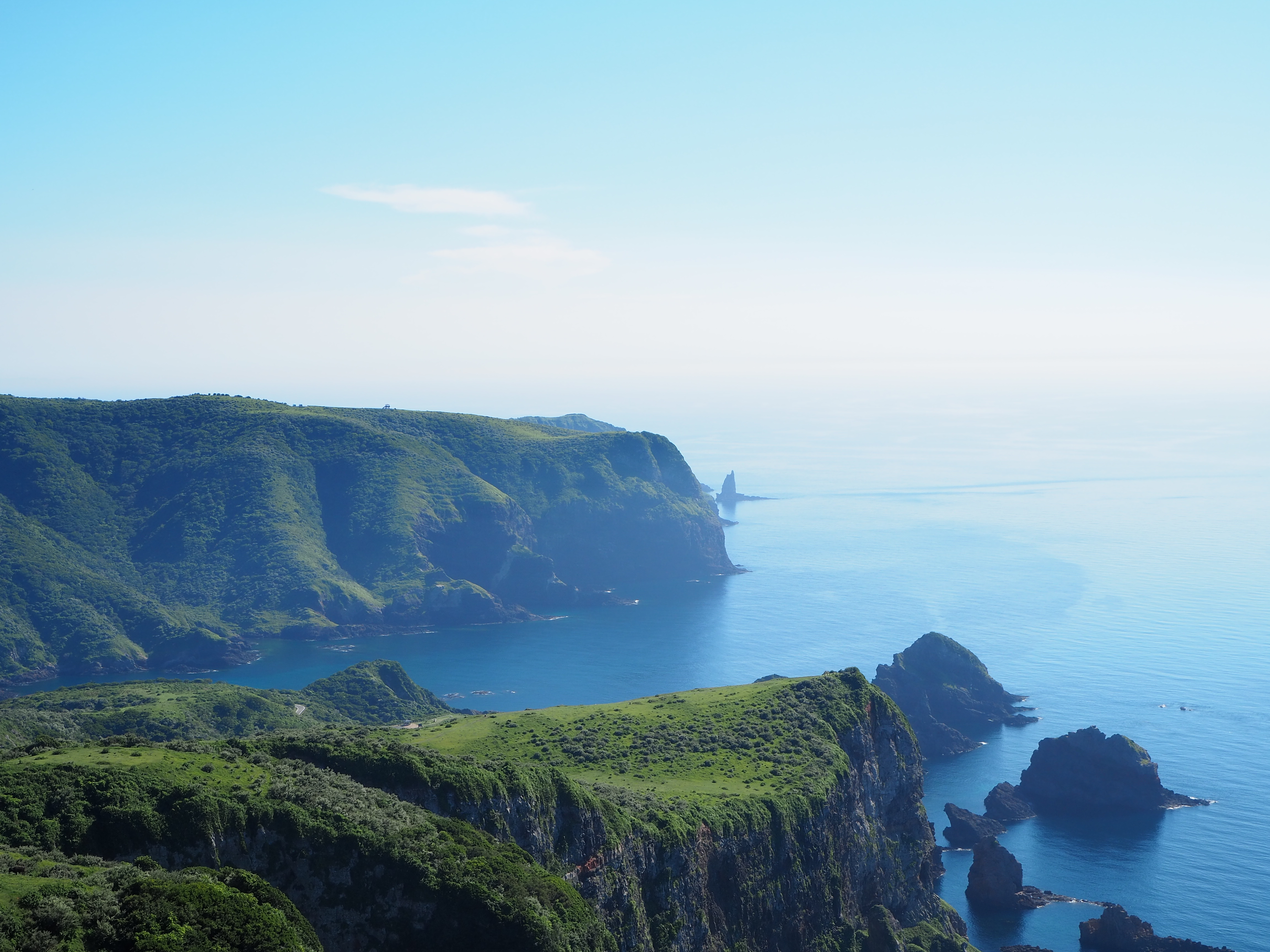 摩天崖頂上Olympus E-M10 Mark III